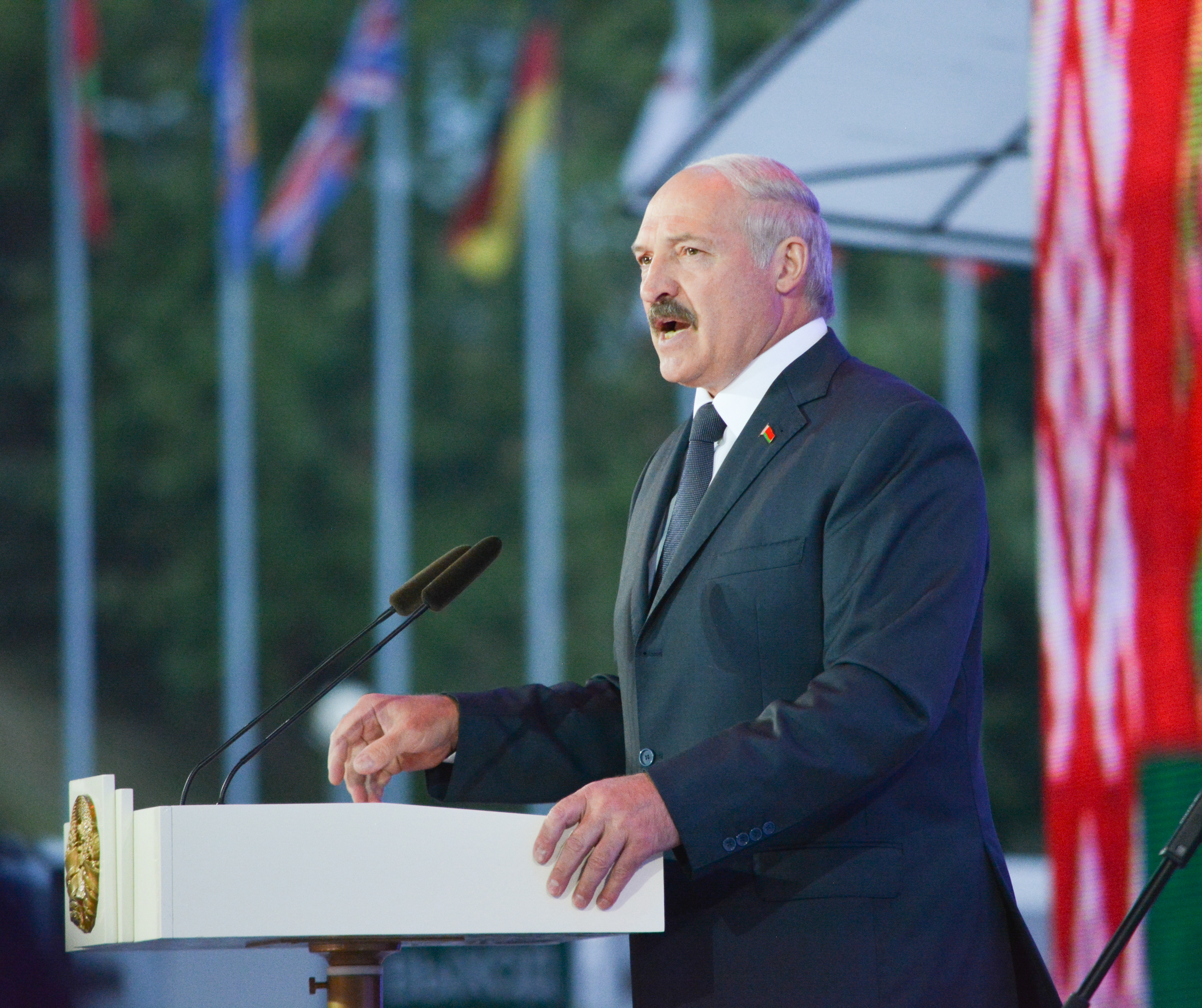 Александр Лукашенко. Открытие фестиваля «Славянский Базар в Витебске» 2014.